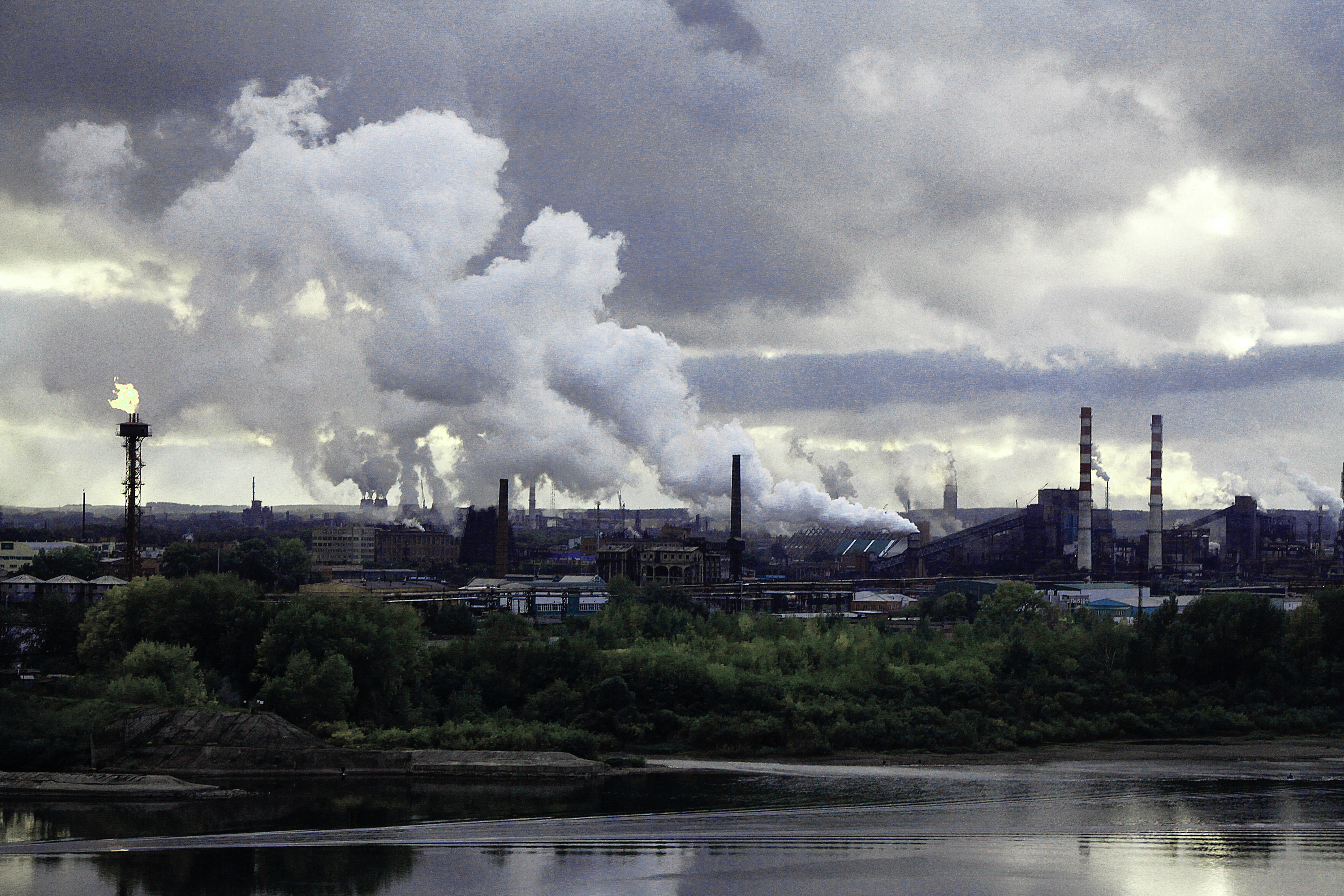 вид на промышленную зону г. Кемерово